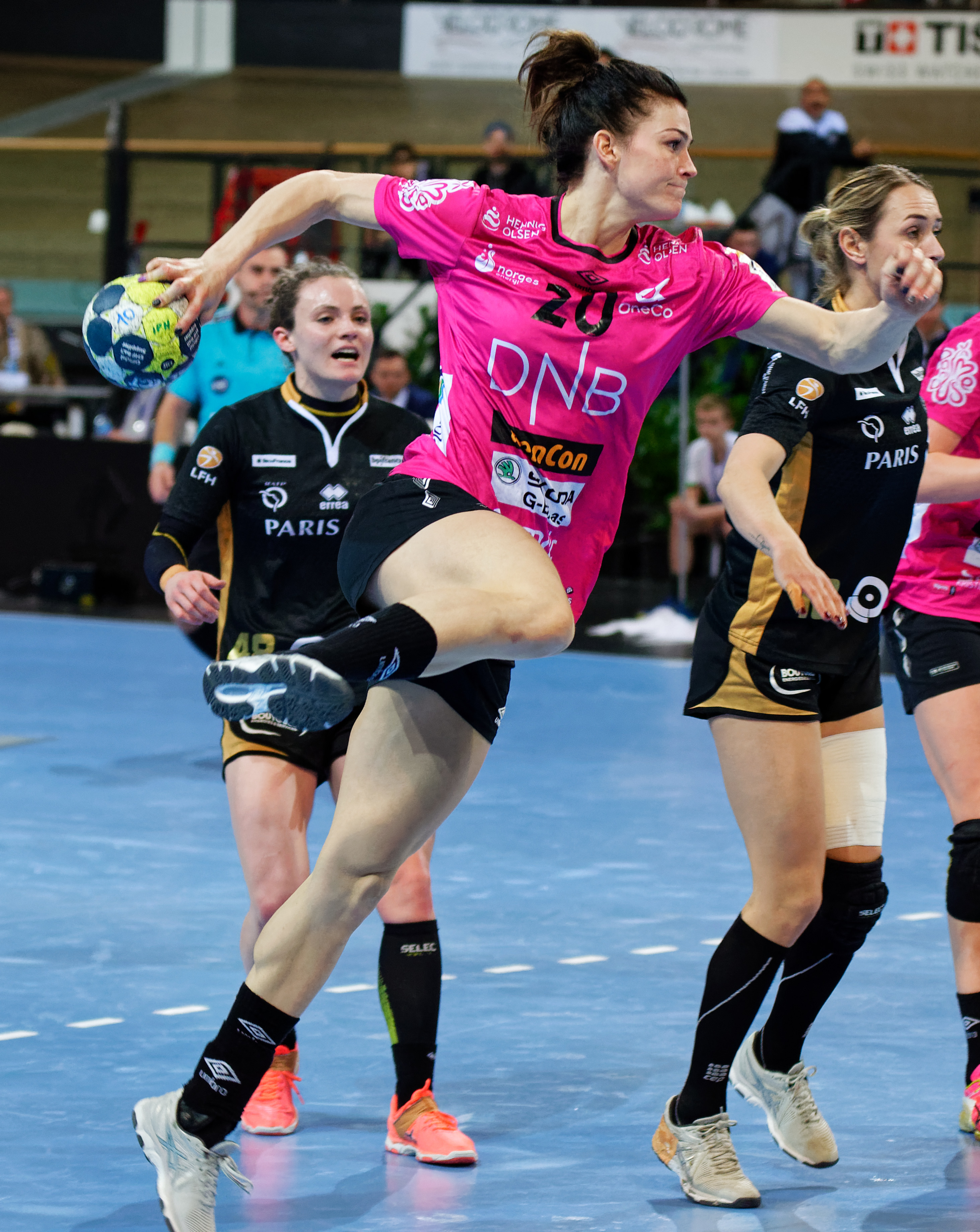 Rencontre du tour principal de coupe EHF entre Issy Paris Hand et les norvégiennes de Vipers Kristiansand au vélodrome de Saint-Quentin en Yvelines, le 03 février 2018.